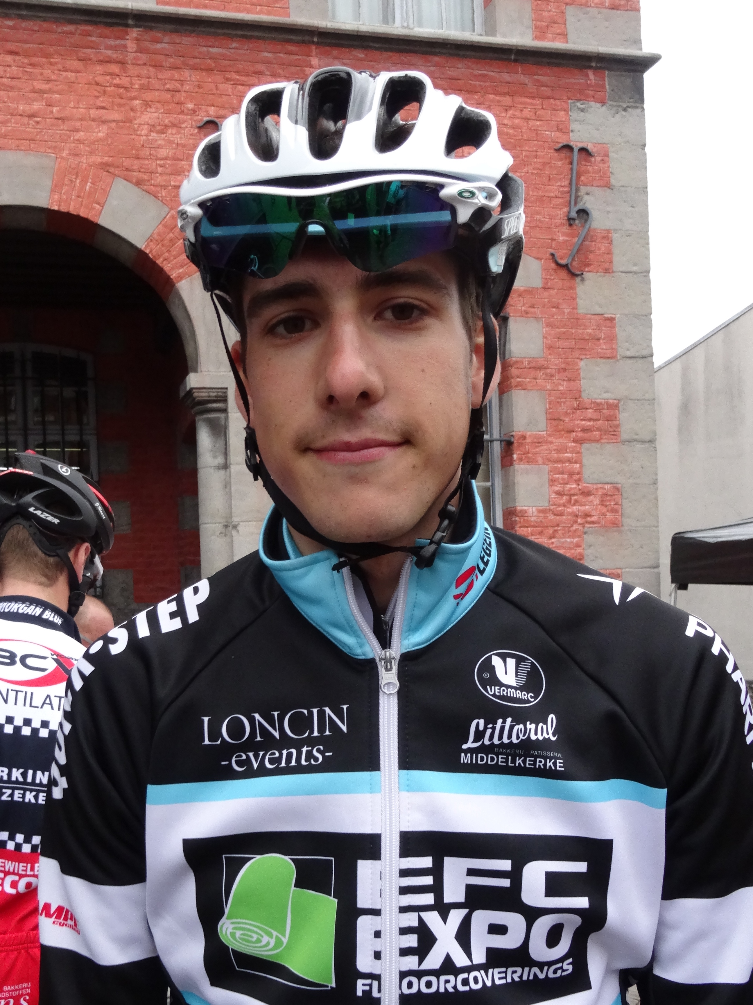 Triptyque des Monts et Châteaux 2014, étape 1, 4 avril 2014, départ d'Antoing. Depicted person: Daan Myngheer Depicted team: EFC-Omega Pharma-Quick Step The creation of these files was made possible thanks to the organizers of the Triptyque des Monts et Châteaux 2014 English | français | +/−